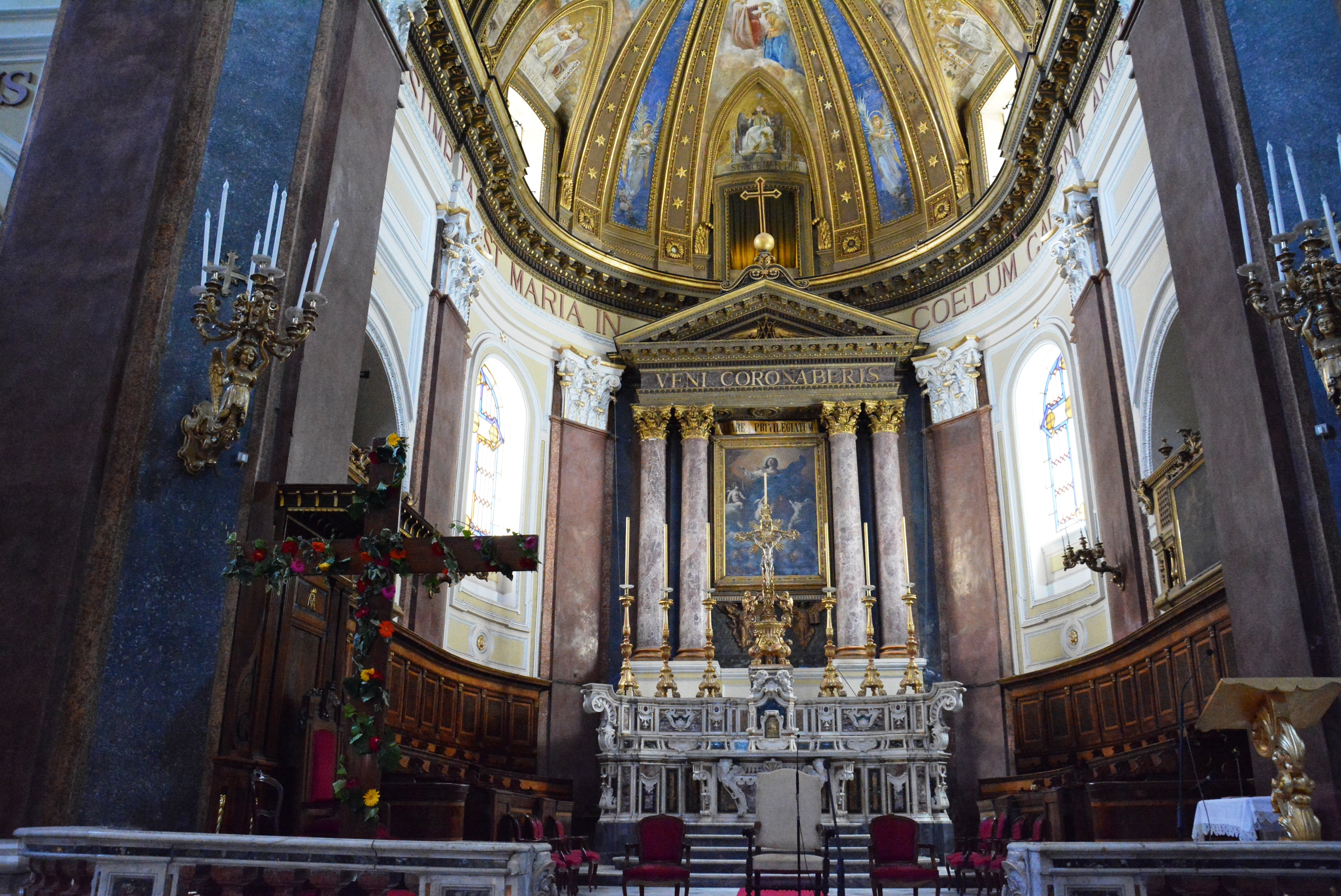 Cattedrale di Maria Santissima Assunta a Castellamma di Stabia